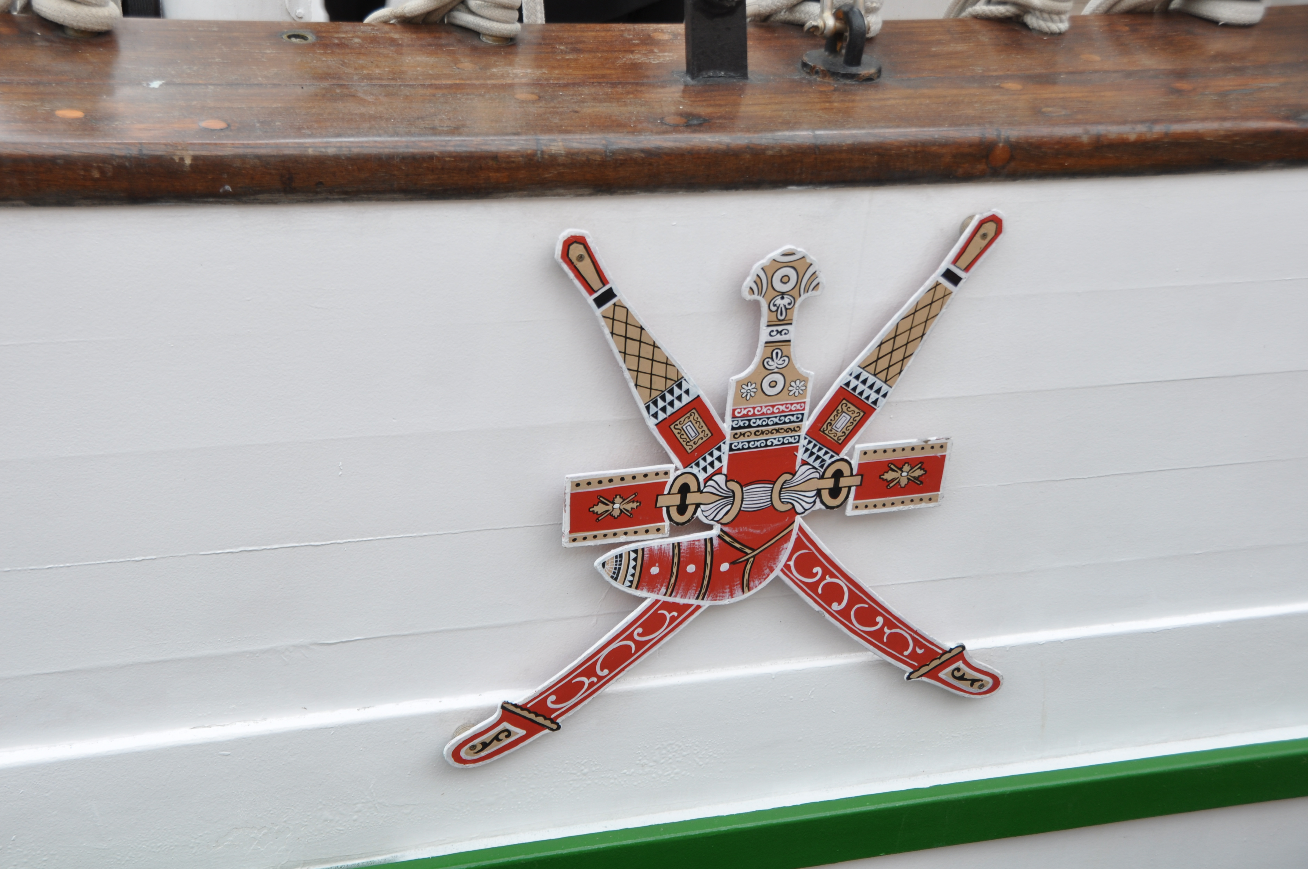 De SHABAB OMAN voor de wal bij Sail Amsterdam 2010.